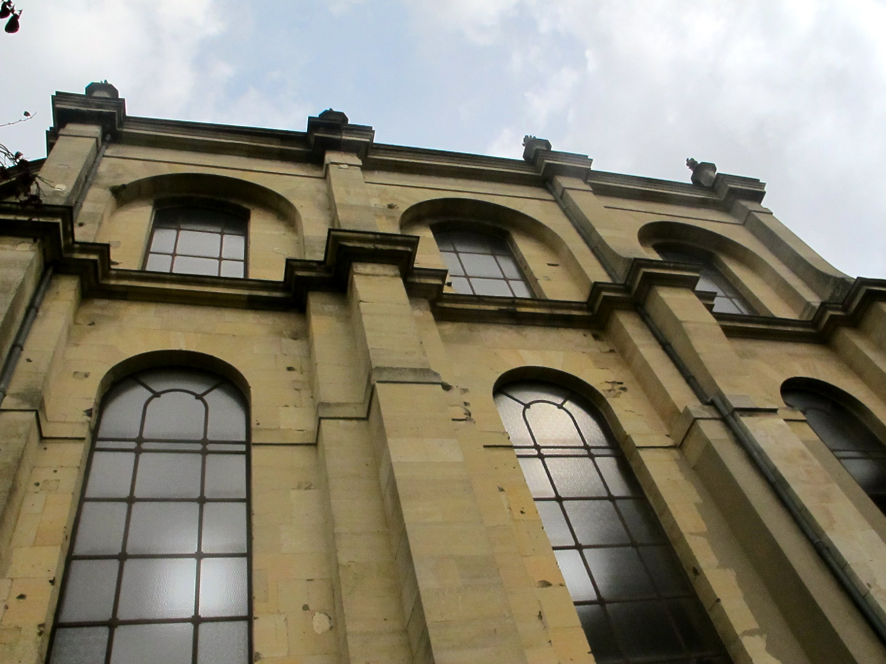 Chapelle du lycée militaire de Saint-Cyr.